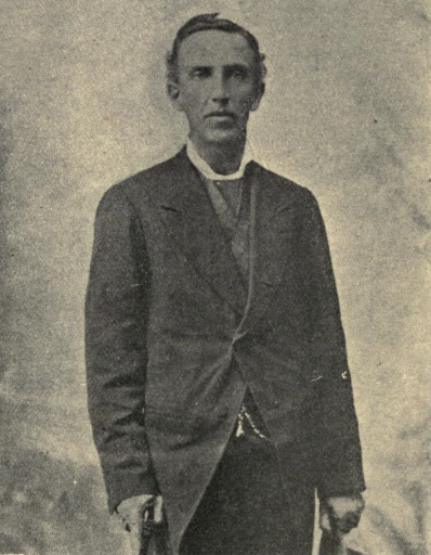 Angel María Arroyo, el Padre Arroyo en 1895.